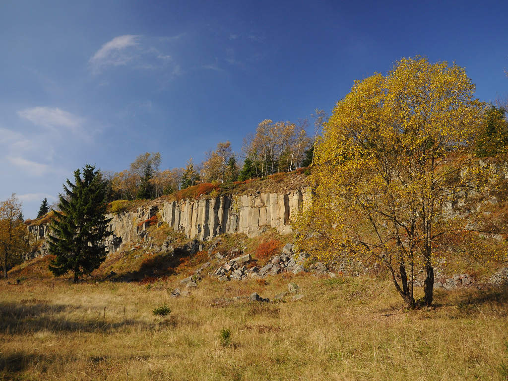 PR Ryžovna - sloupcovitá odlučnost čediče, stará stěna lomu